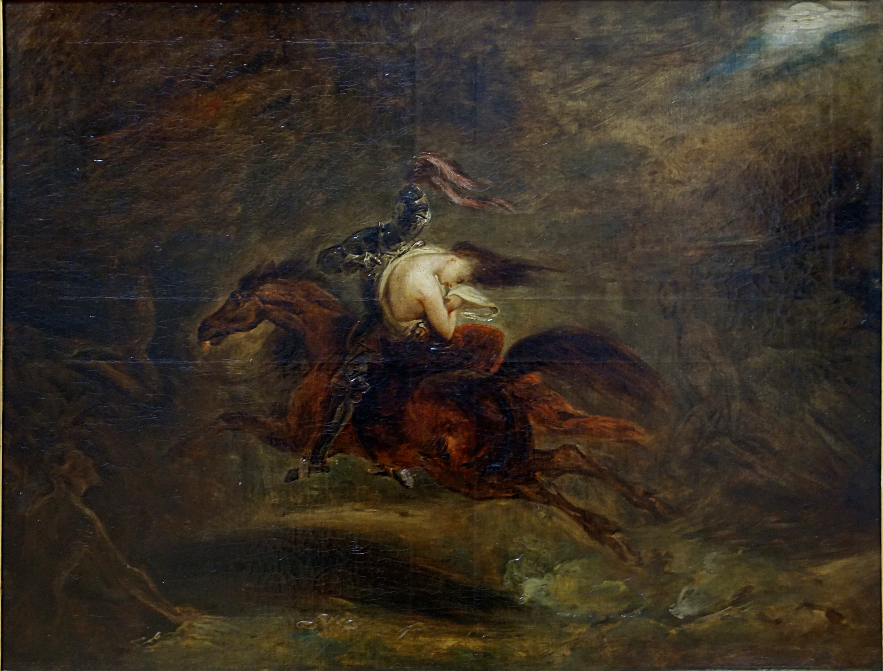 Lénore. Les morts vont vite, Palais des Beaux-Arts de Lille (Nord).